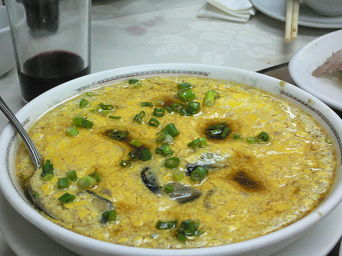 Chinese steamed egg 蒸三色水蛋 蒸水蛋